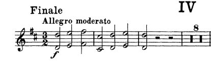 Tema della IV sezione della Sinfonia n.2 di Sibelius; questo stesso tema è stato usato da Gigi D'Agostino in "L'amour toujours"